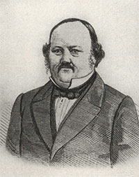 Lars Erik Elfforss (1817-1869)